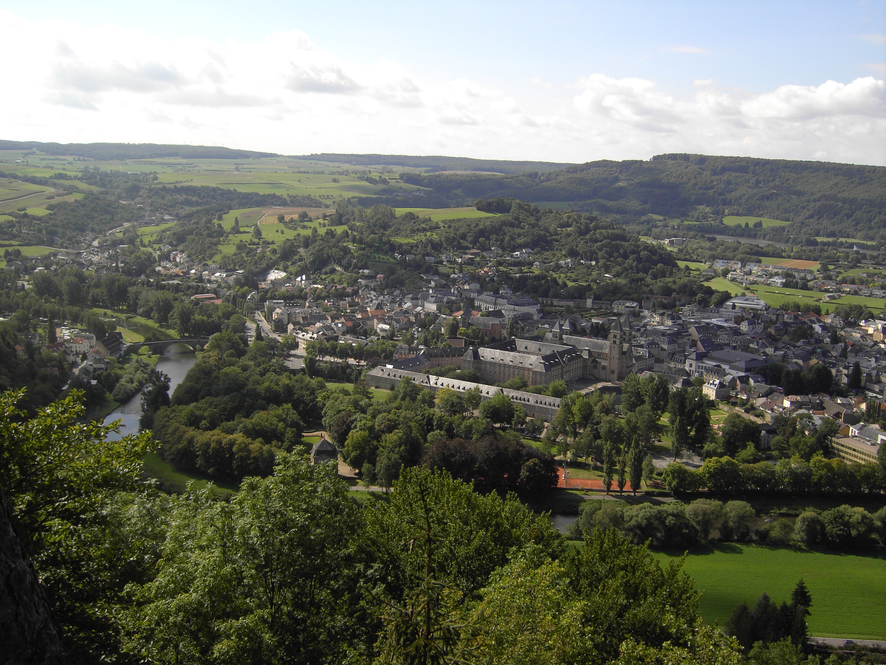 Echternach - General view